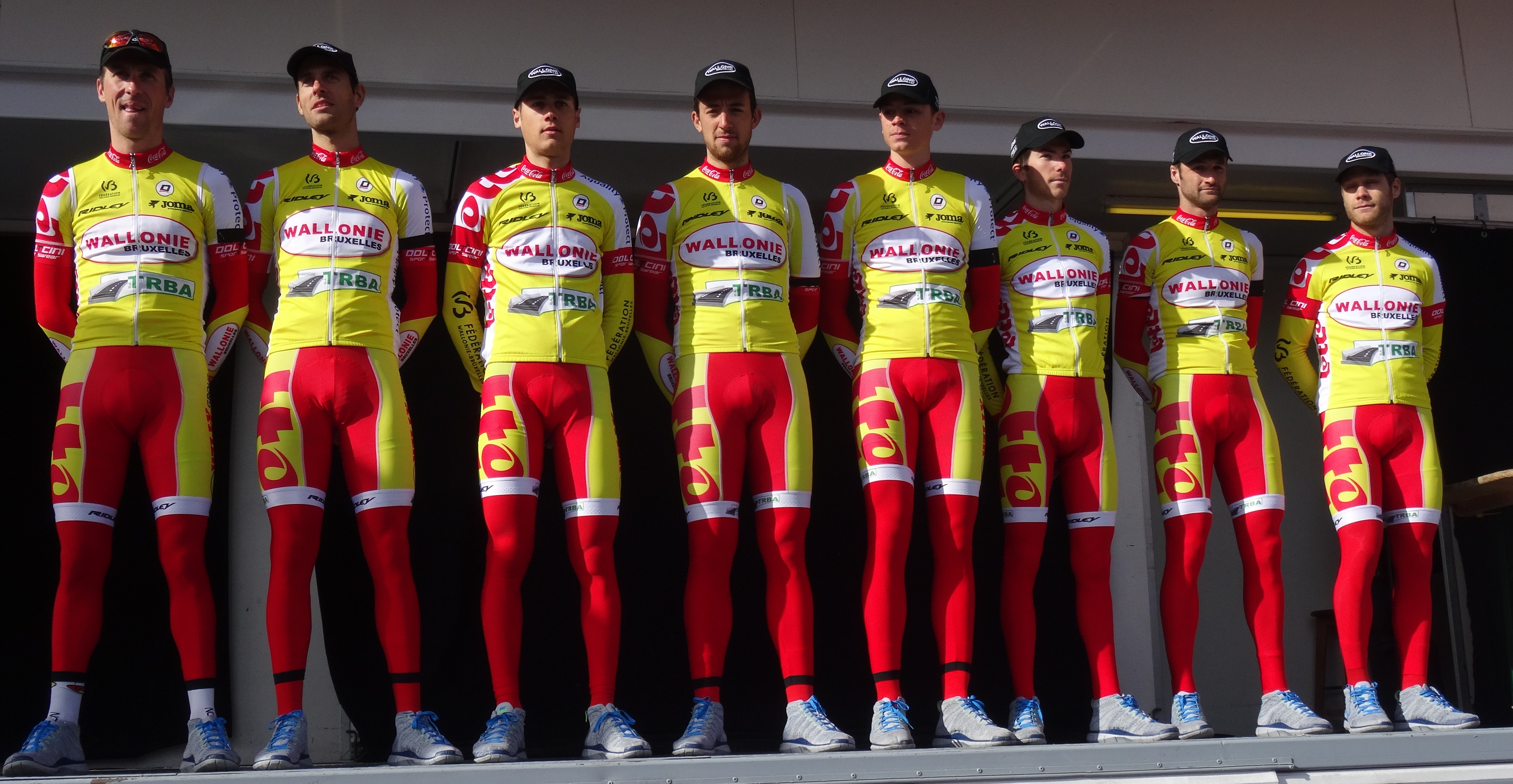 Reportage réalisé le mercredi 4 mars à l'occasion du départ du Samyn des Dames 2015 et du Samyn 2015 à Quaregnon, Belgique.